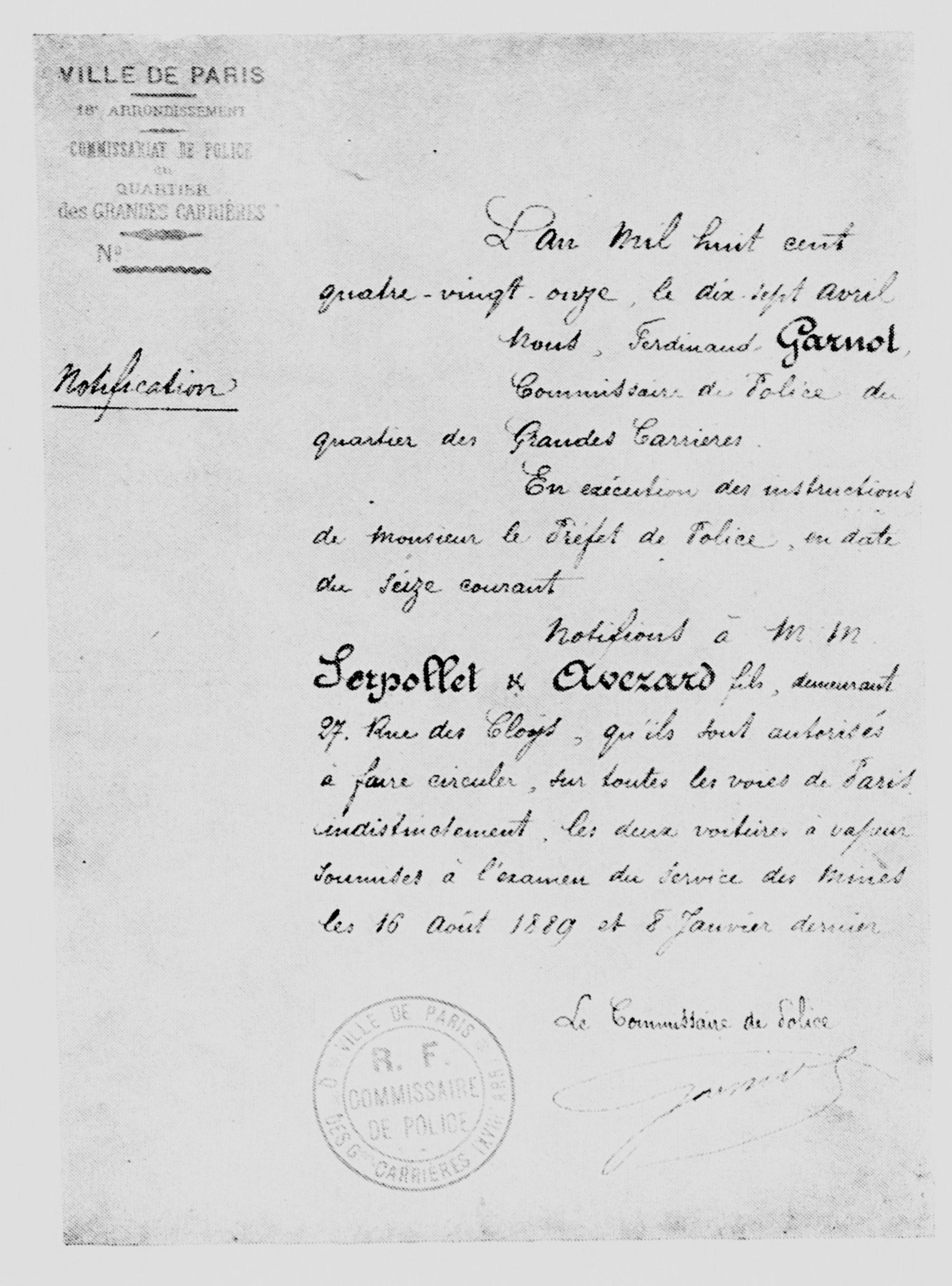 Permis de conduire datant du 17 avril 1891, délivré à Paris.